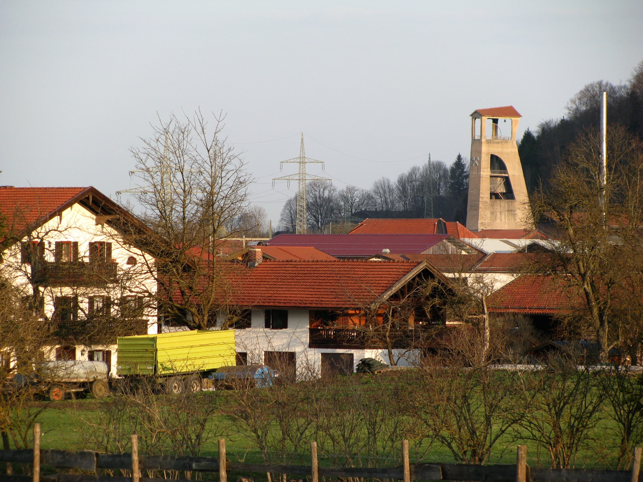 Förderturm von Althausham aus gesehen